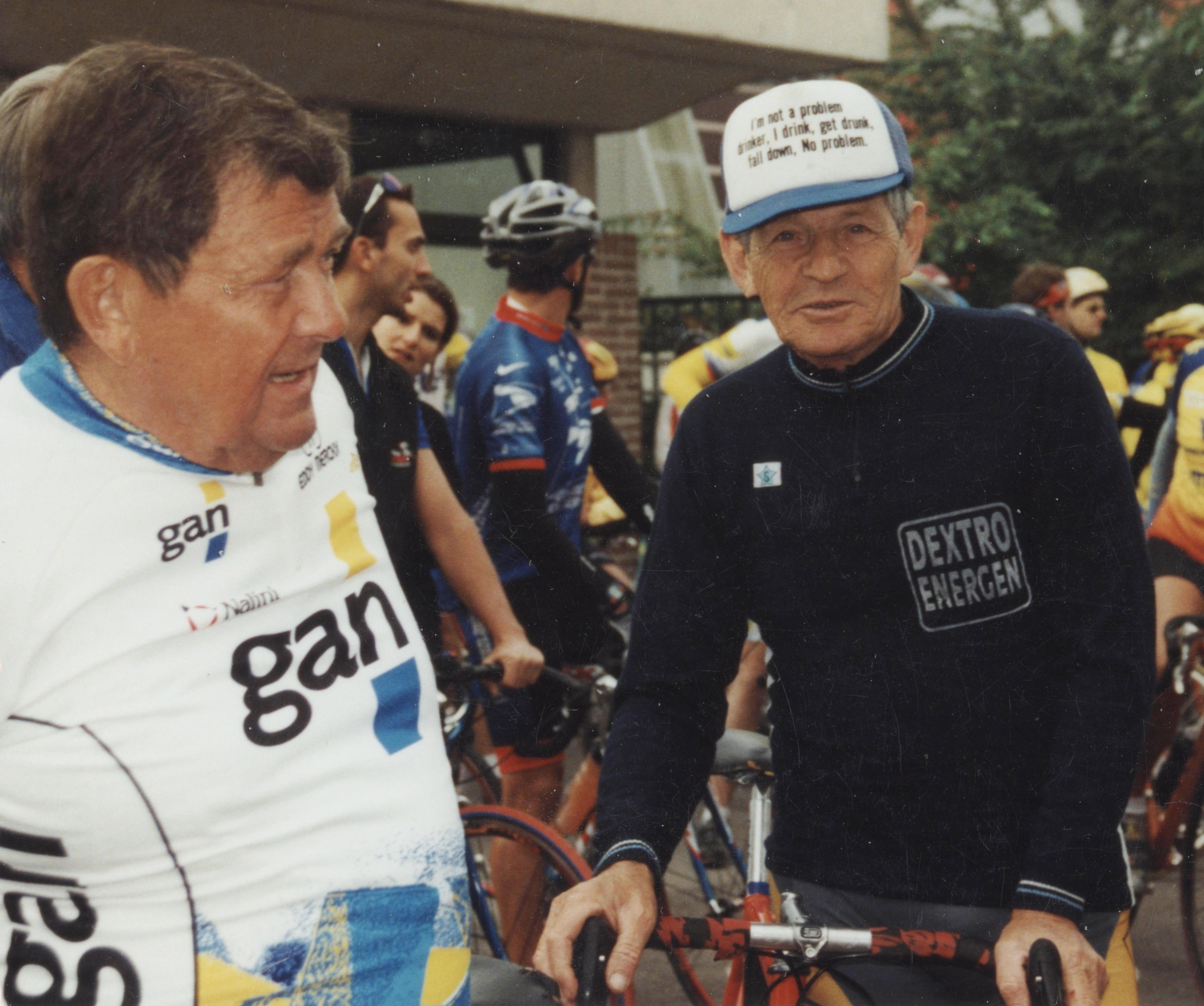 Willy Kemp, lénks an Aldo Bolzan, riets.